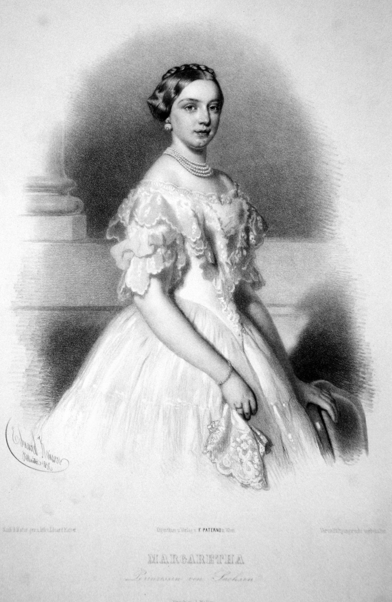 Erzherzogin Margarethe von Sachsen (1840-1858). Ehefrau des Erzherzogs Karl Ludwig. Lithographie von Eduard Kaiser, 1856